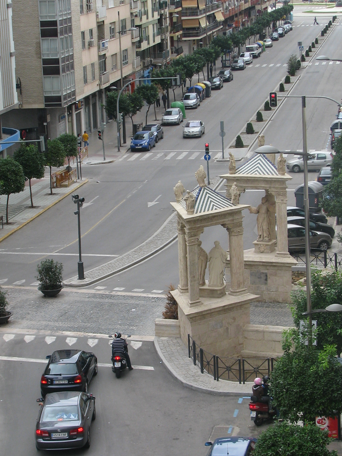 Avenida Santos Patronos con monumento central del siglo XVIII.